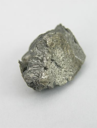 Bildbeschreibung: Holmium Quelle: Foto aus meiner Elementesammlung Fotograf: Tomihahndorf Datum: März 2006